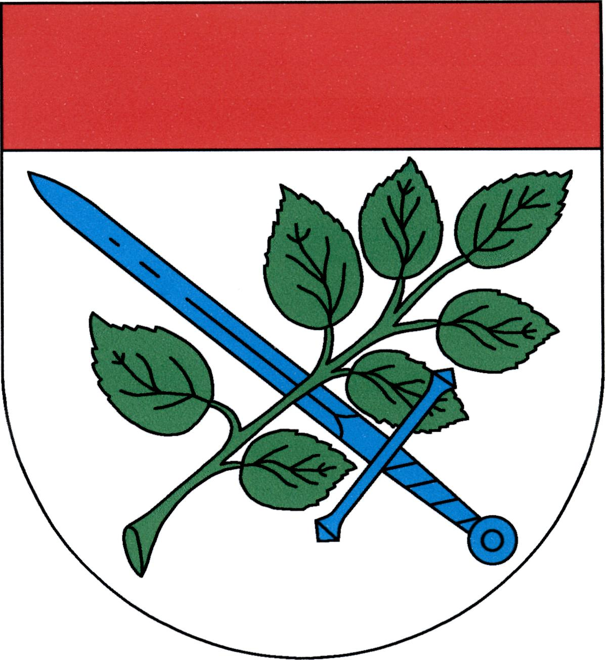 Znak obce Velký Malahov